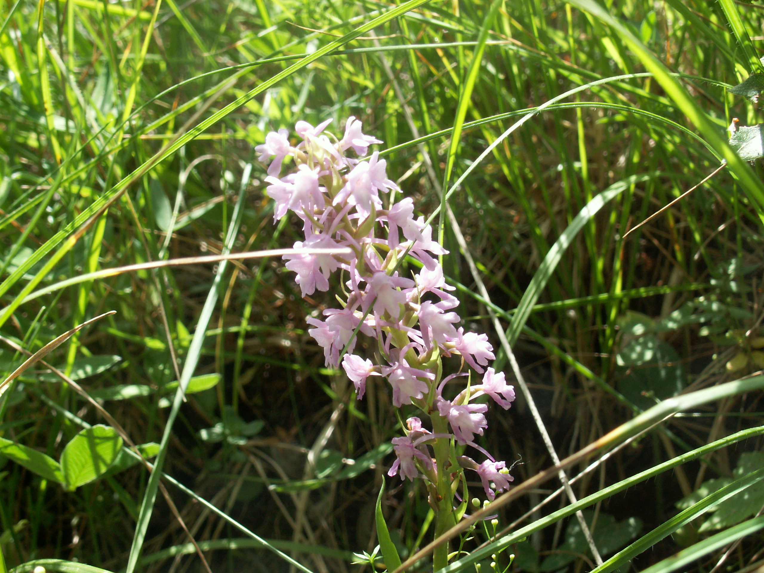 Orchis moucheron à la toubière du Peuil - France (38) Photo prise par Stéphane TASSON Date: Juin 2006